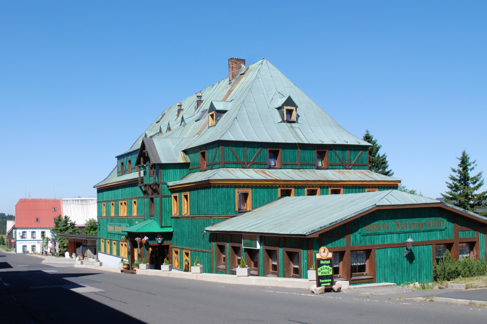 Boží Dar, hotel Zelený dům, 21. 7. 2013